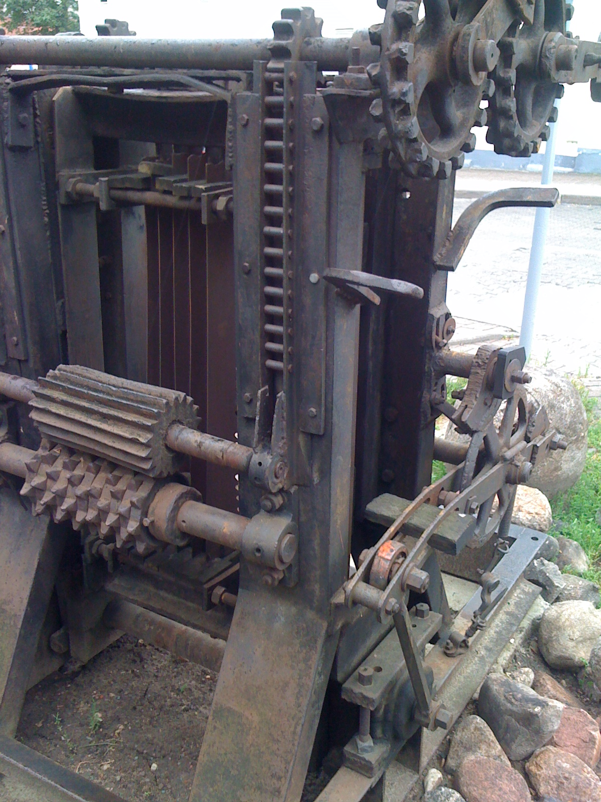 Старинная лесопильная рама, установленная на Раковской улице в Минске